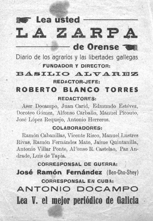 Anuncio de La Zarpa